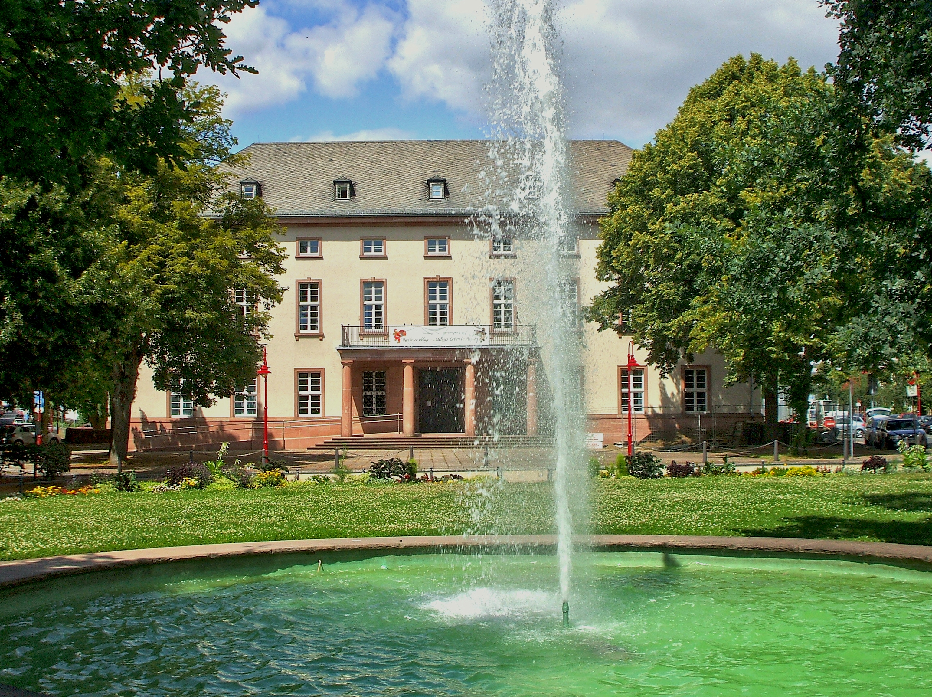 Staatsarchiv Marburg, Friedrichsplatz 15